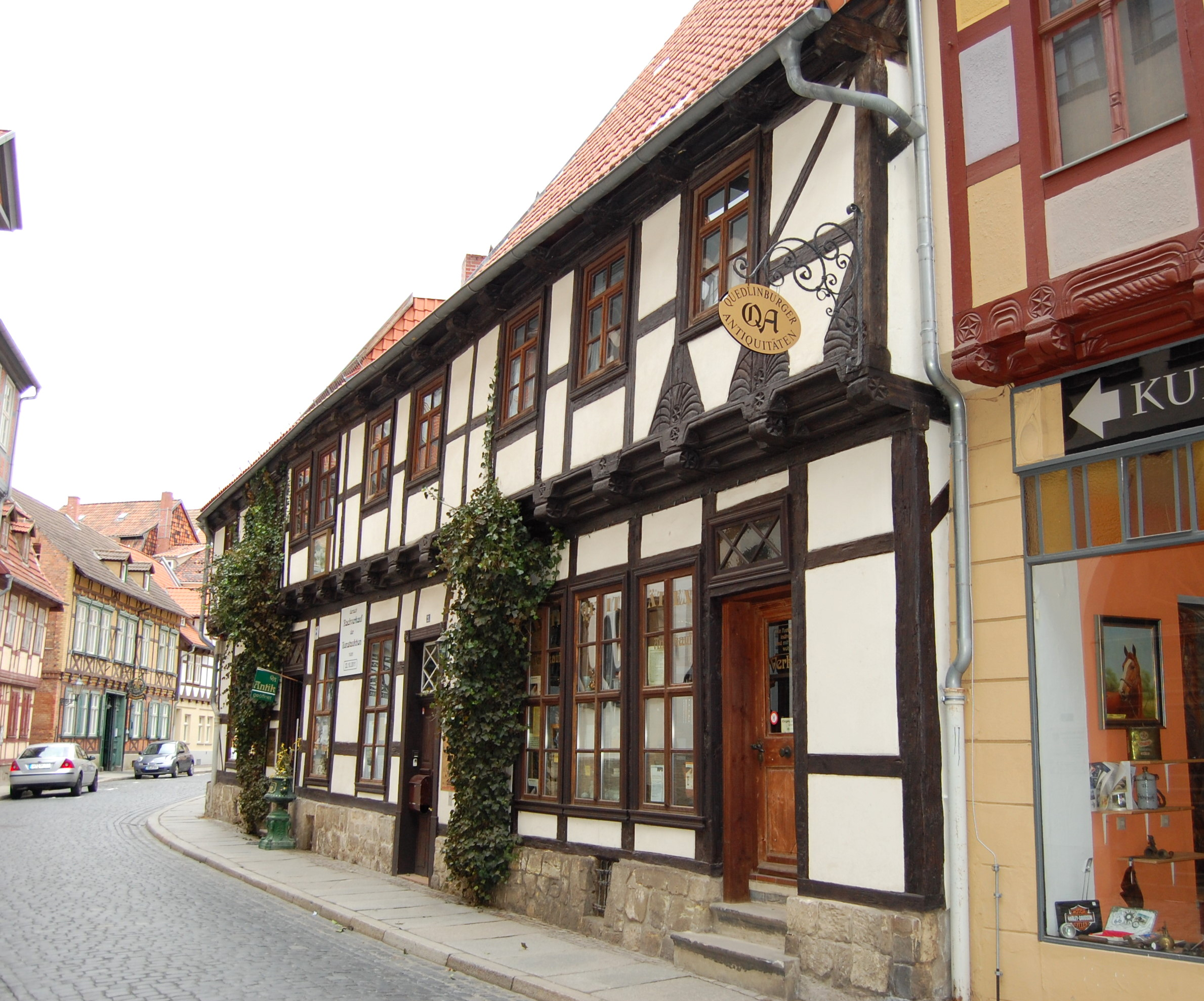 Blasiistr. Quedlinburg